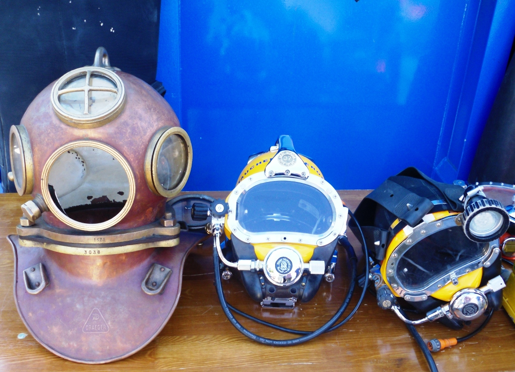 Verschiedene Taucherhelme, links von Draeger aus Kupferblech